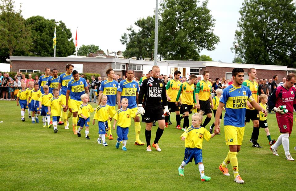 DTD cambuur